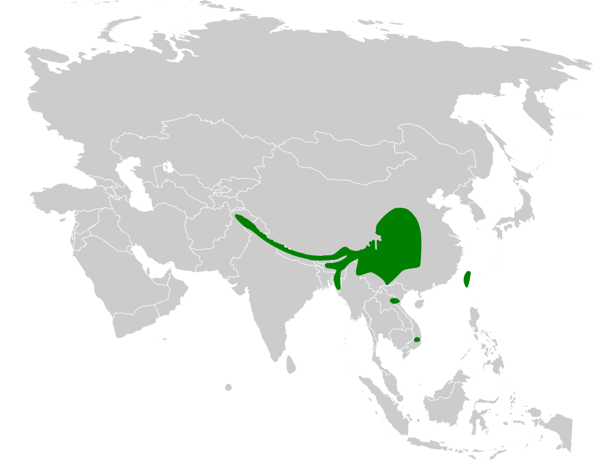 Parus monticolus distribution map